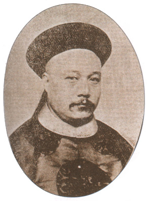 冯汝骙（？－1911年），字星岩，河南祥符（今属开封市）人。清末江西巡撫。